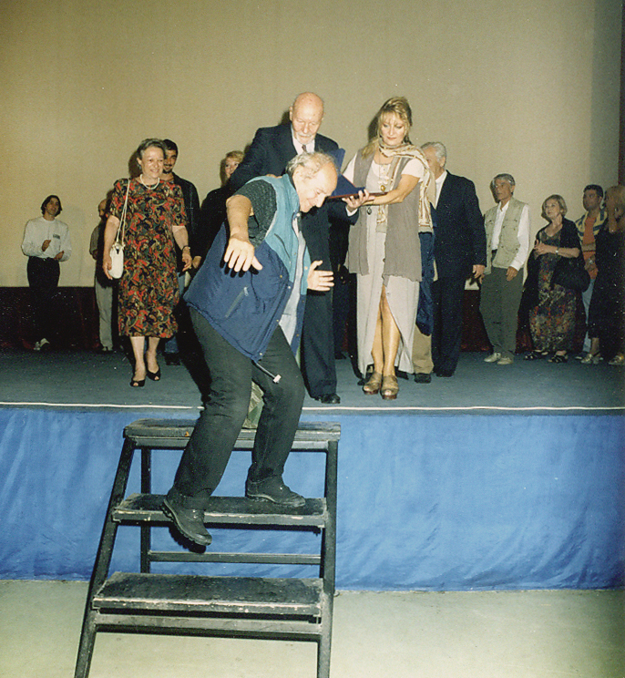 Bata Paskaljević i Danica Maksimović pomažu srpskom doajenu Mići Tomiću da siđe sa bine, posle dodele nagrade "Pavle Vujisić" na Filmskim susretima u Nišu 1997. godine